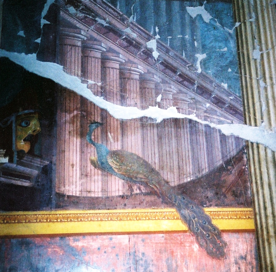 Détail d'une fresque de la villa de Poppée à Oplontis (Italie)